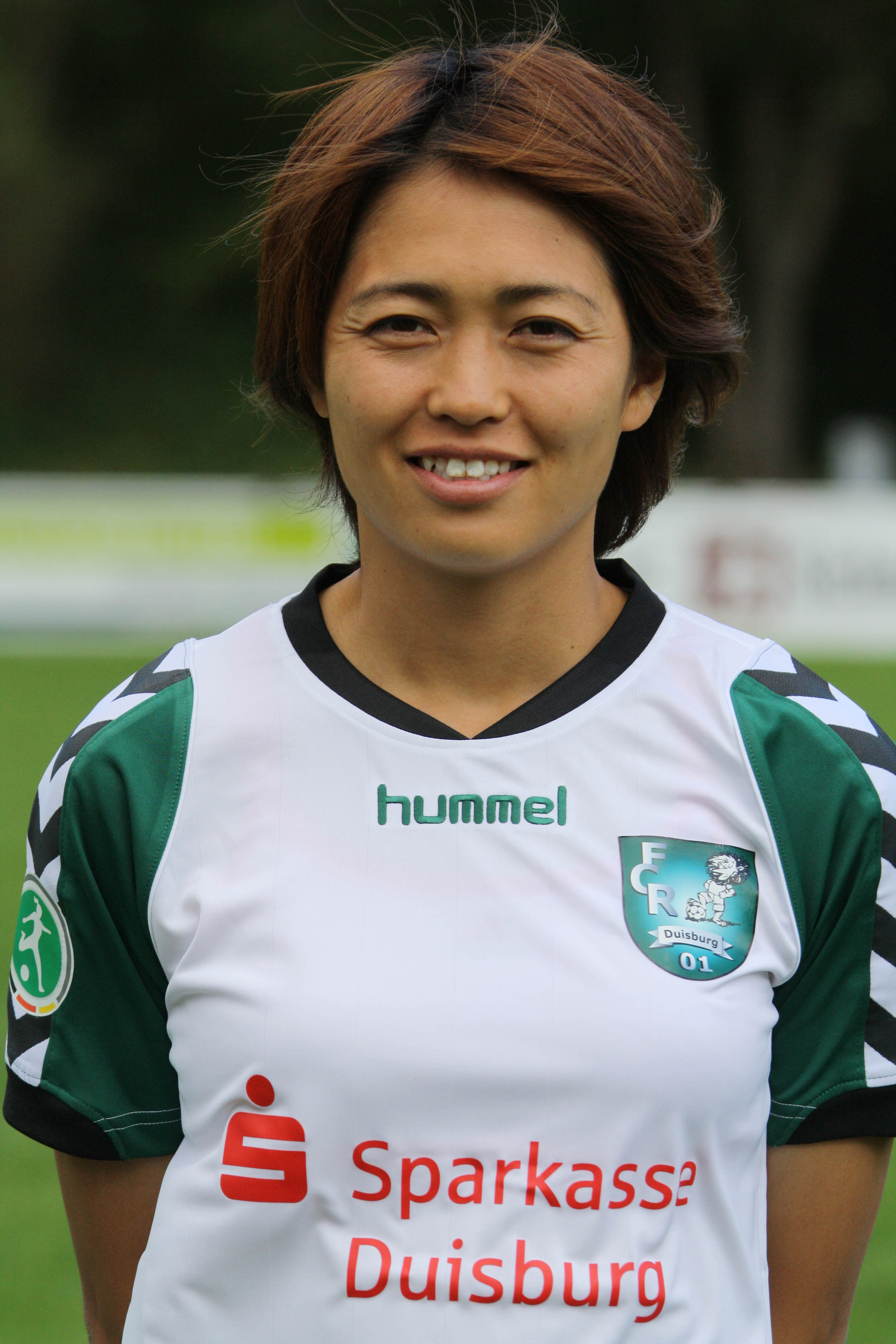 Kozue Ando, FCR 2001 Duisburg, Saison 2011/12